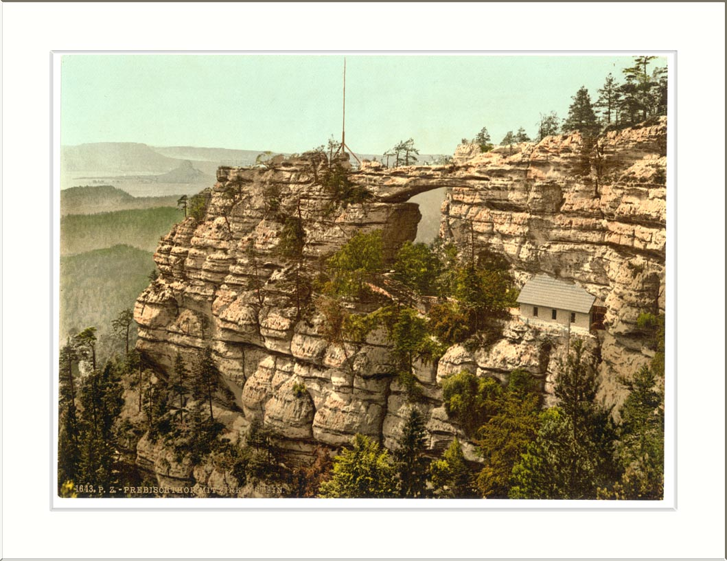 Prebischtor and the Kirkelstein Bohemian Switzerland Bohemia Austro-Hungary